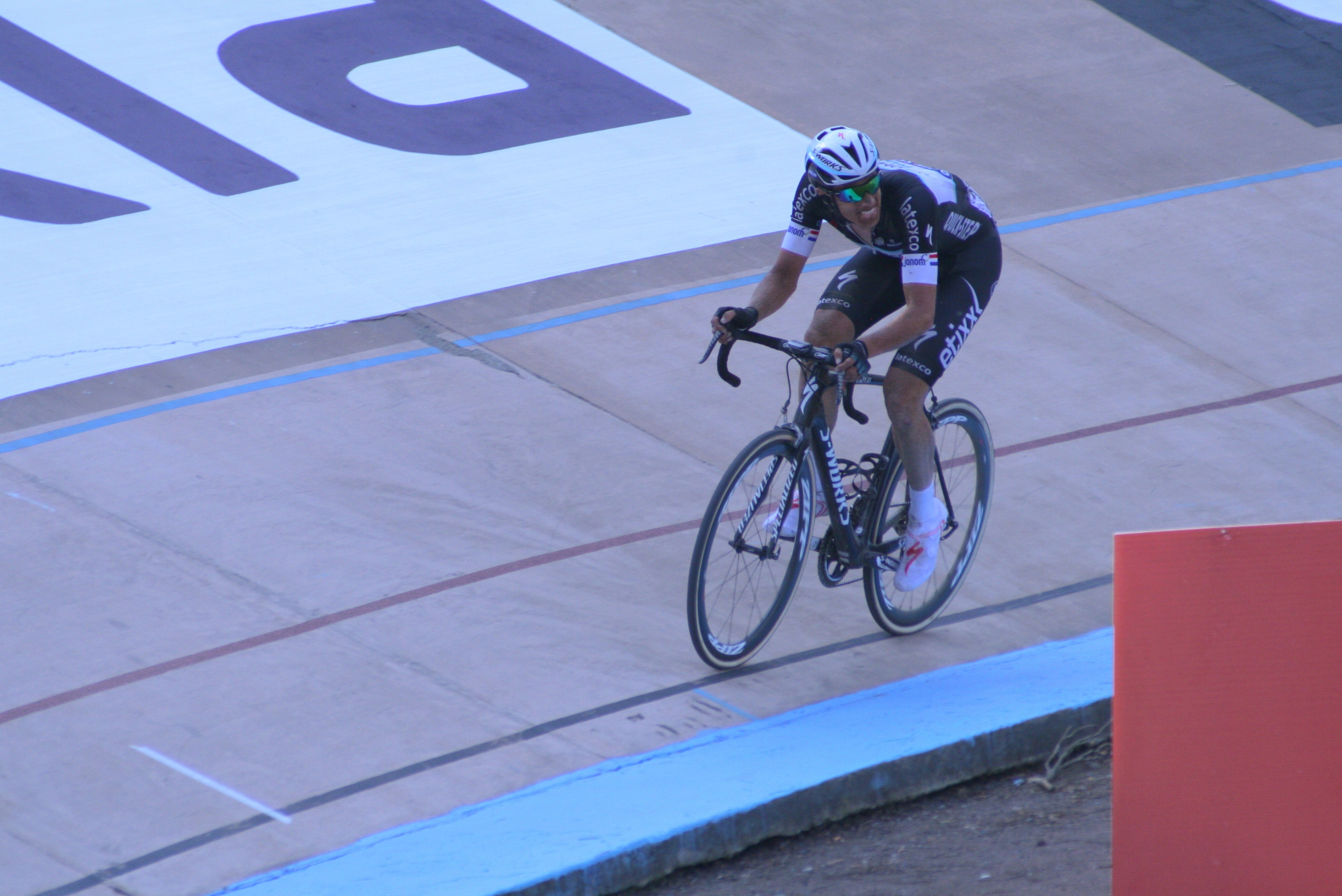 Paris-Roubaix 2014, vélodrome de Roubaix Niki Terpstra